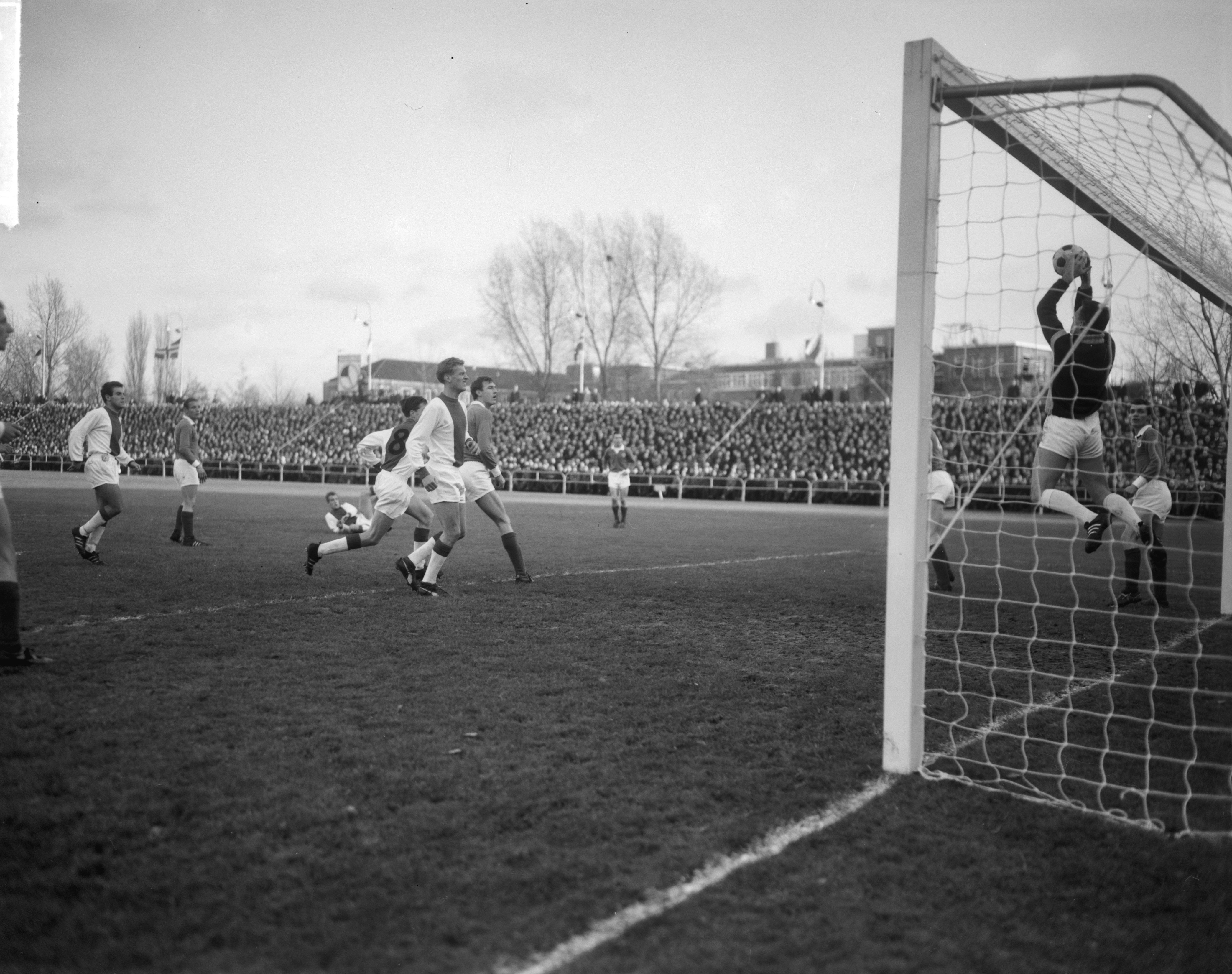 Collectie / Archief : Fotocollectie Anefo Reportage / Serie : [ onbekend ] Beschrijving : GVAV tegen Ajax 3-1, GVAV doelman Tonny van Leeuwen redt. Ajax spelers vlnr. Bennie Muller, Johan Crijff (met nr. 8) en Klaas Nuninga Annotatie : Dit was de officiële debuutwedstrijd van Cruijff in het eerste van Ajax in de competitie. Hij maakt het enige doelpunt voor Ajax Datum : 15 november 1964 Locatie : Groningen (stad) Trefwoorden : sport, voetbal Persoonsnaam : Cruijff, Johan, Leeuwen, Tonny van, Muller, Bennie, Nuninga, Klaas Instellingsnaam : AJAX Fotograaf : Bilsen, Joop van / Anefo Auteursrechthebbende : Nationaal Archief Materiaalsoort : Negatief (zwart/wit) Nummer archiefinventaris : bekijk toegang 2.24.01.04 Bestanddeelnummer : 917-1309